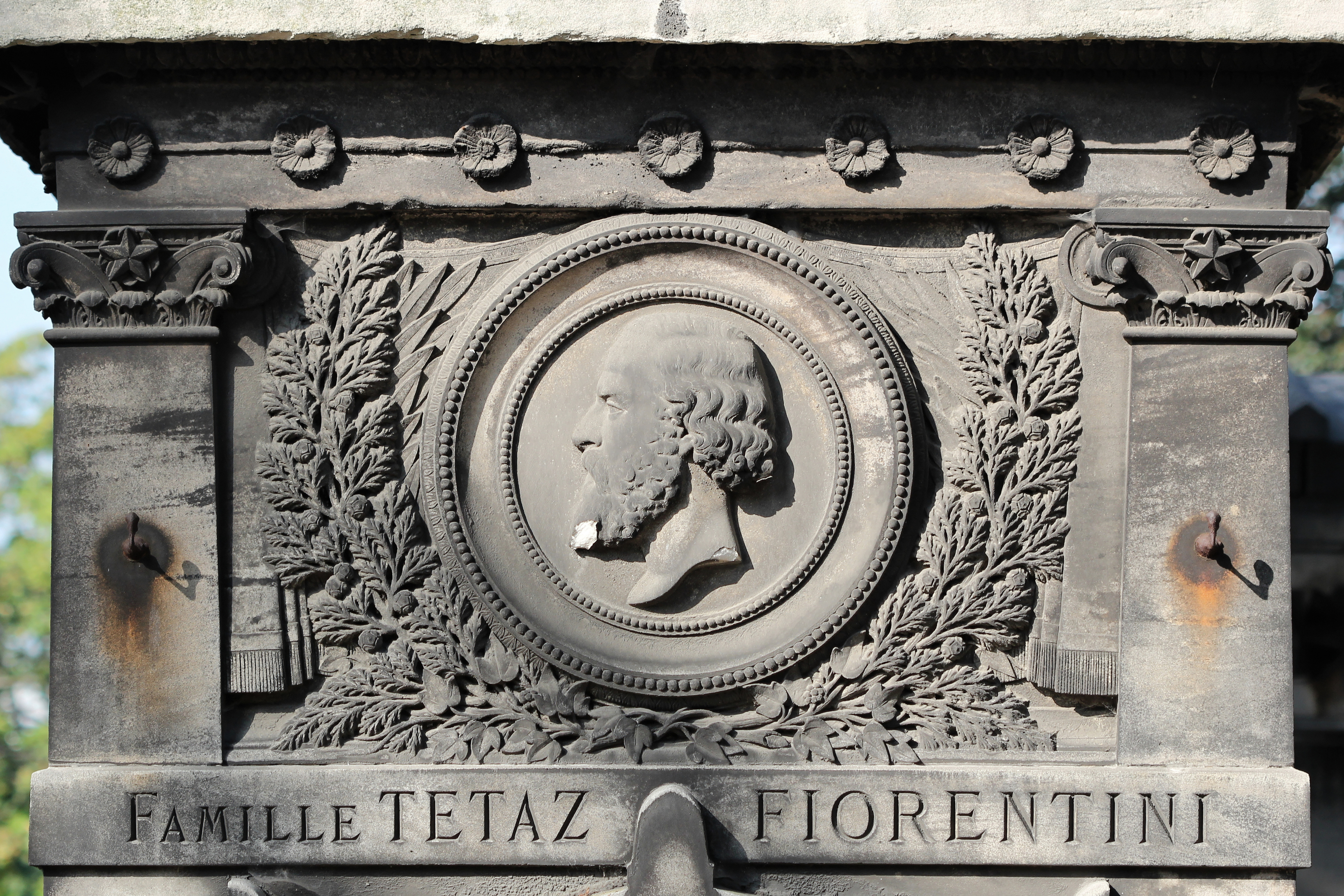 Sépulture de l'architecte Jacques-Martin Tétaz (1818-1865). Mausolée en pierre de taille orné d'un médaillon et surmonté d'un sarcophage externe.